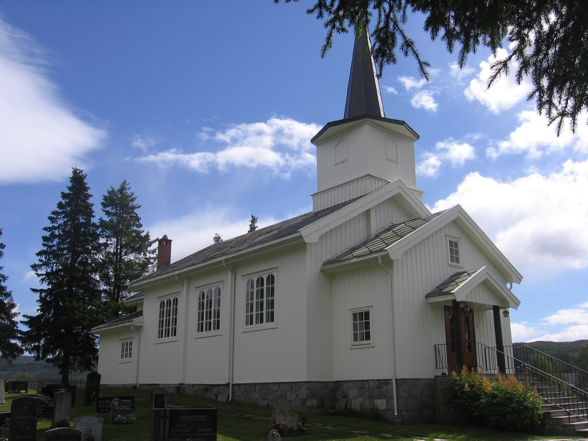 Nice wooden church in Geilo Geilo church [?]